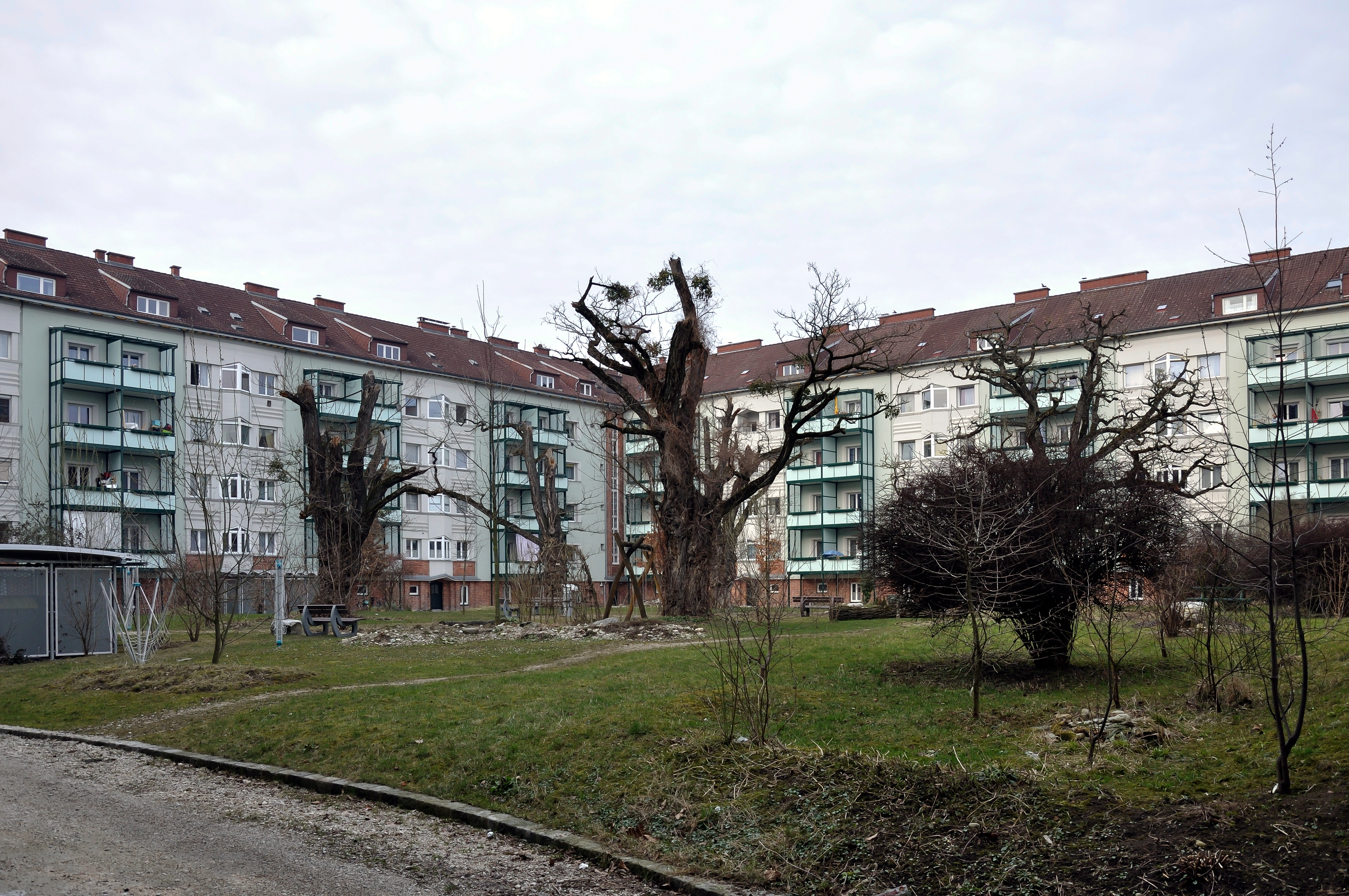 Dametzhof